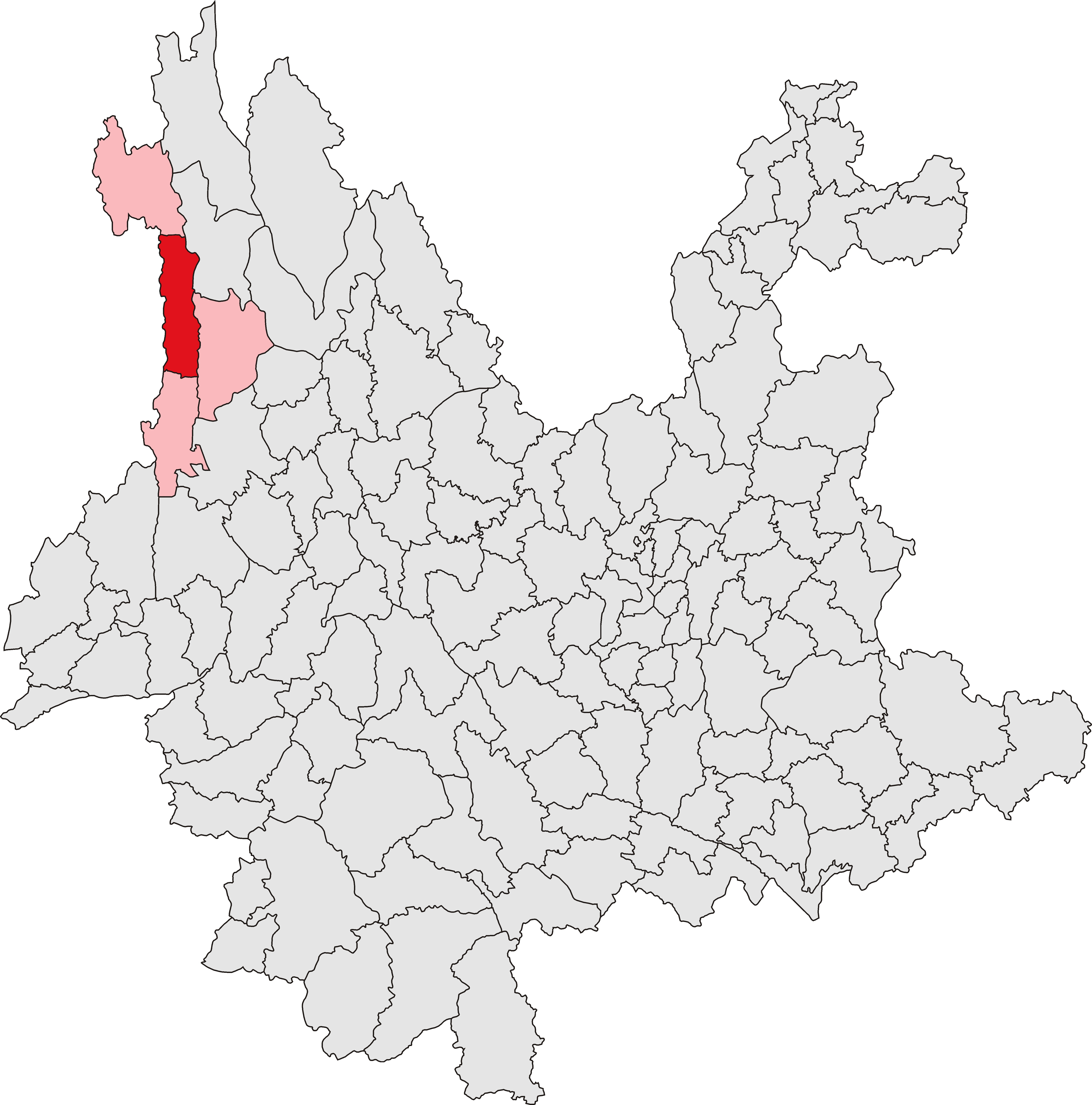 福贡县位置图